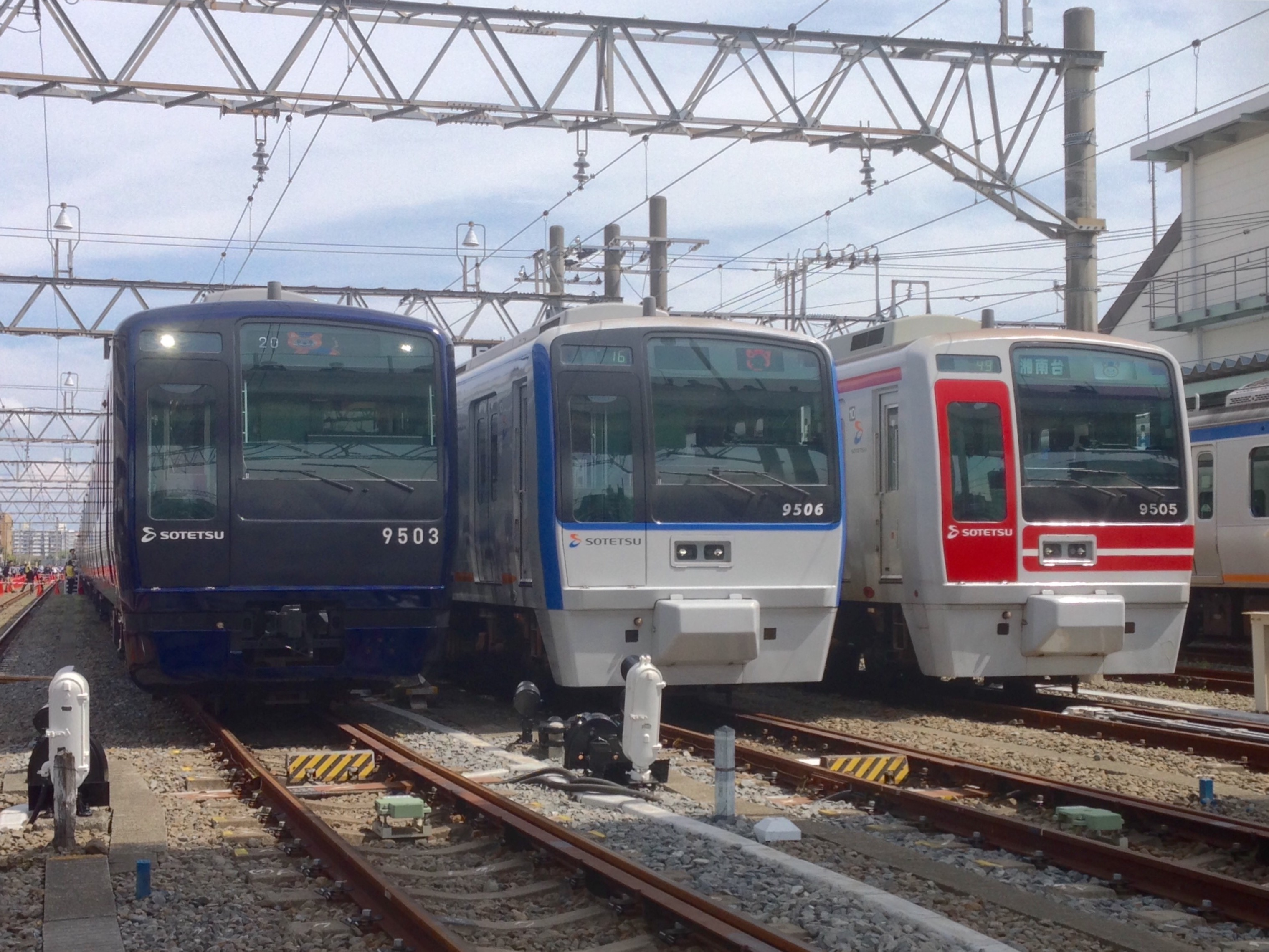 相鉄9000系ヨコハマネイビーブルーリニューアル車両（9703F）、デビュー記念撮影会（相模大塚駅構内）にて。旧塗装車（右）、グループカラー新塗装車（真ん中）と並んでいる。